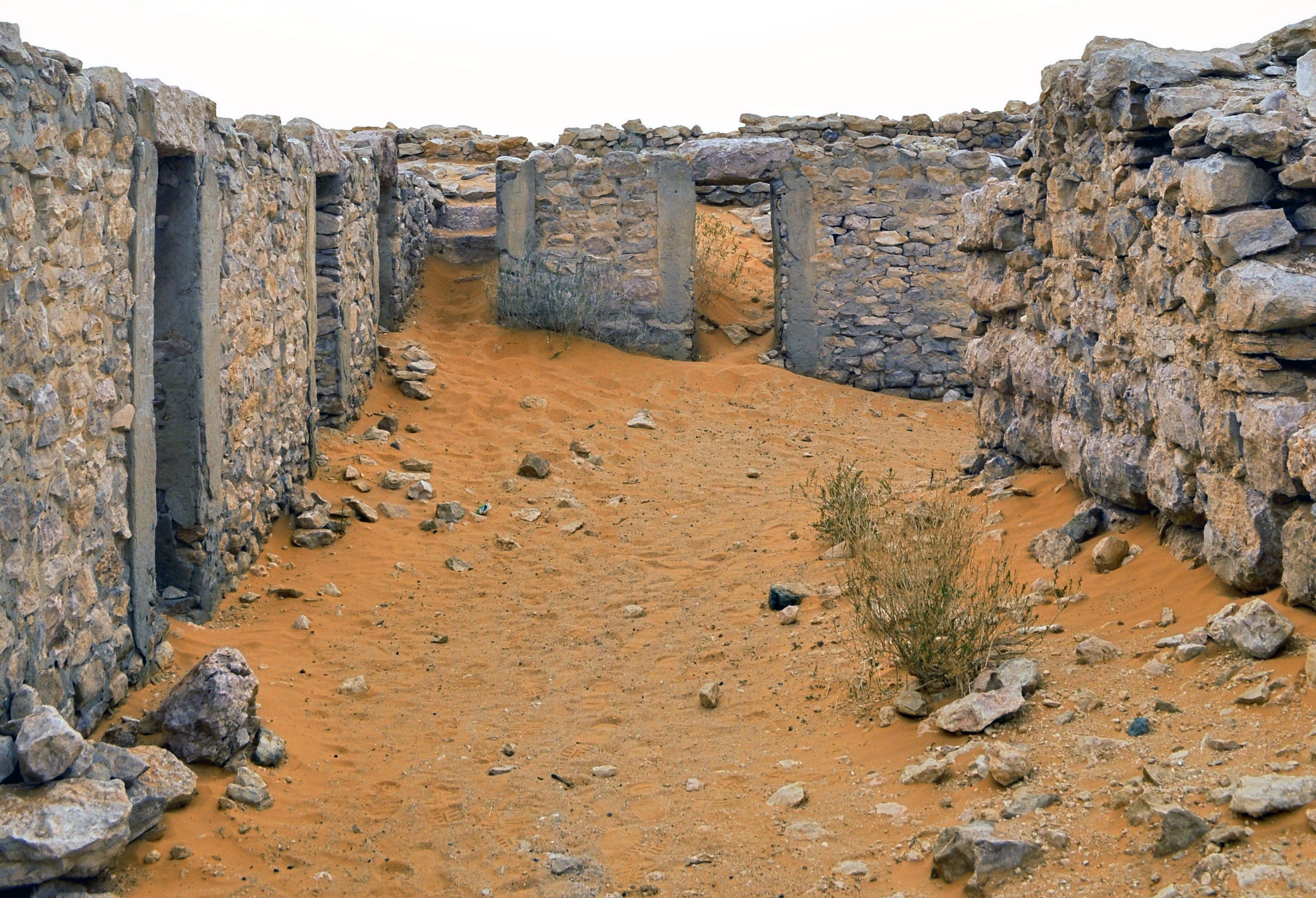 Kleinkastell Tisavar: Südlicher Kastellbereich, zu sehen ist unter anderem ein Treppenaufgang zum Wehrgang an der Westmauer. Rechts die Südwand des Stabsgebäudes. Der im Originalbild sichtbare Rotstich wurde entfernt und das Format auf den archäologischen Teil zugeschnitten.